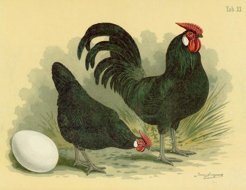 Hamburger-Huhn. Gallus dom. hamburgieus. Hamburghs. Poule de Hamburg.